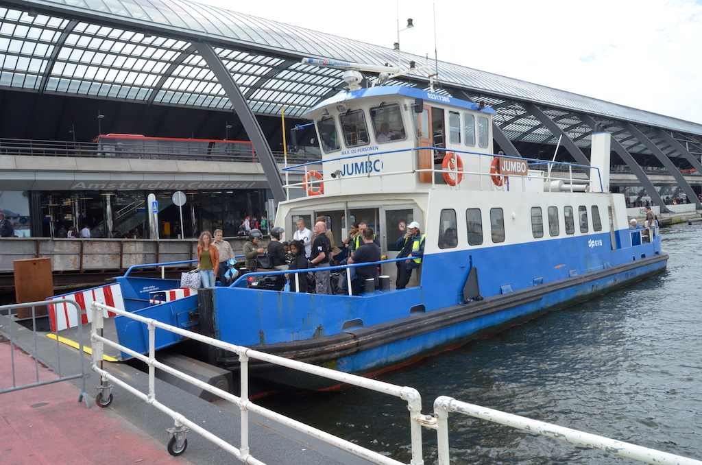 GVB IJveer Jumbo (ex-32) op het IJ. Foto: Erik Swierstra.